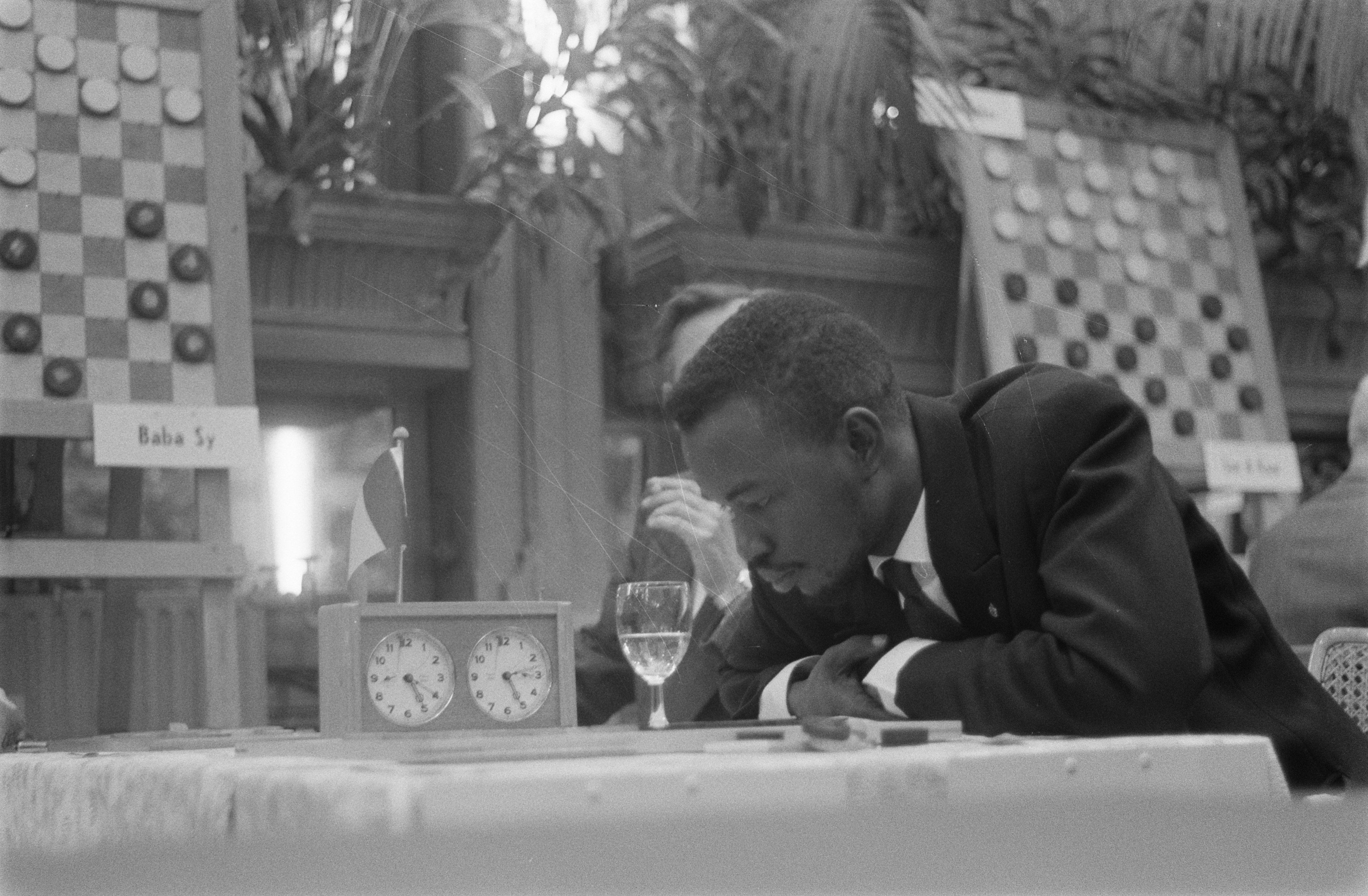 Wereldkampioenschap dammen te Amsterdam, Baba Sy